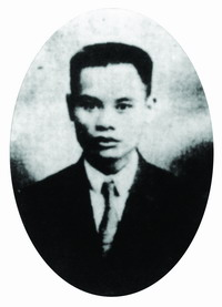 Pham Hong Thai (1892-1924)